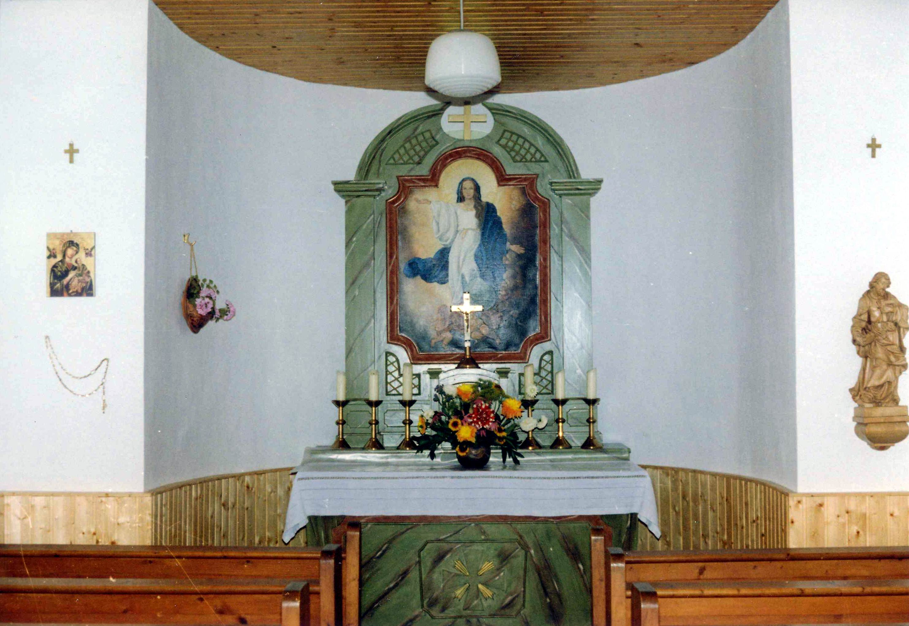 Altarraum der Dorfkapelle Denkenreuth